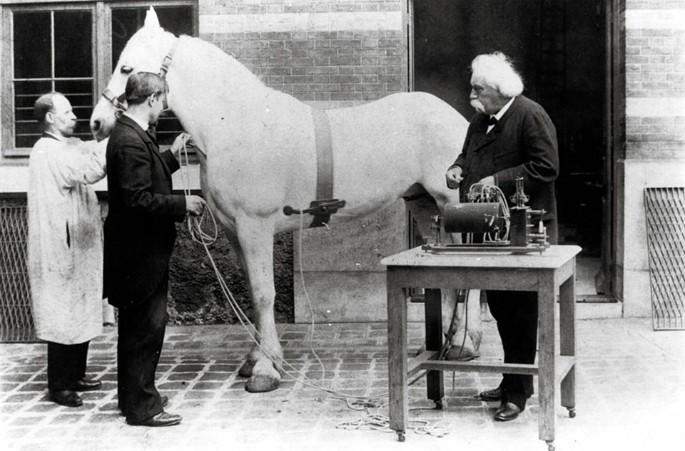 Dựa theo thí nghiệm đặt ống thông tim được thực hiện thành công trên một con ngựa bởi bác sĩ thú y Auguste Chauveau cách đó 75 năm, Forssmann đã lần đầu tiên tiến hành thí nghiệm tương tự trên người